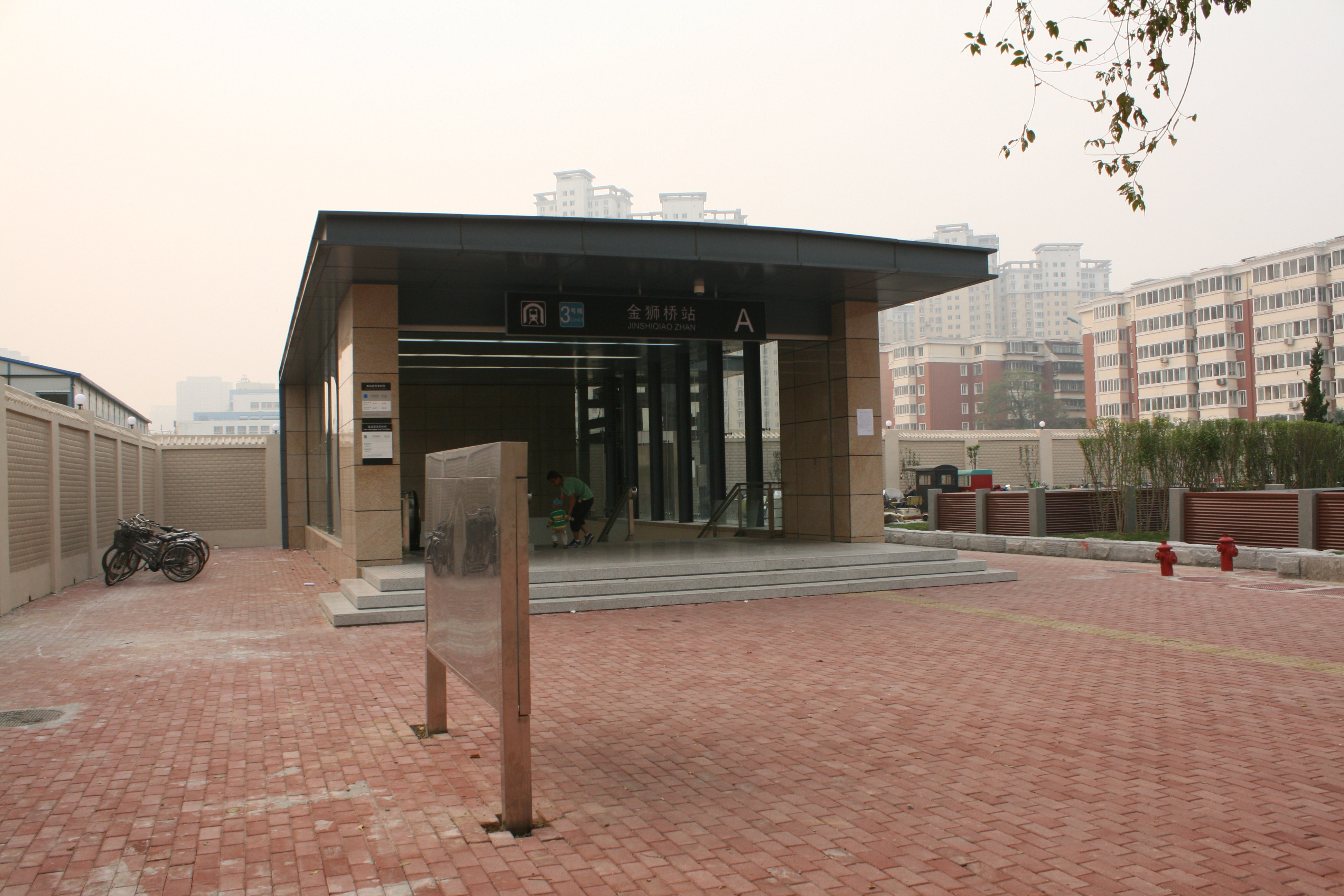 天津地鐵三號線金獅橋站A出口